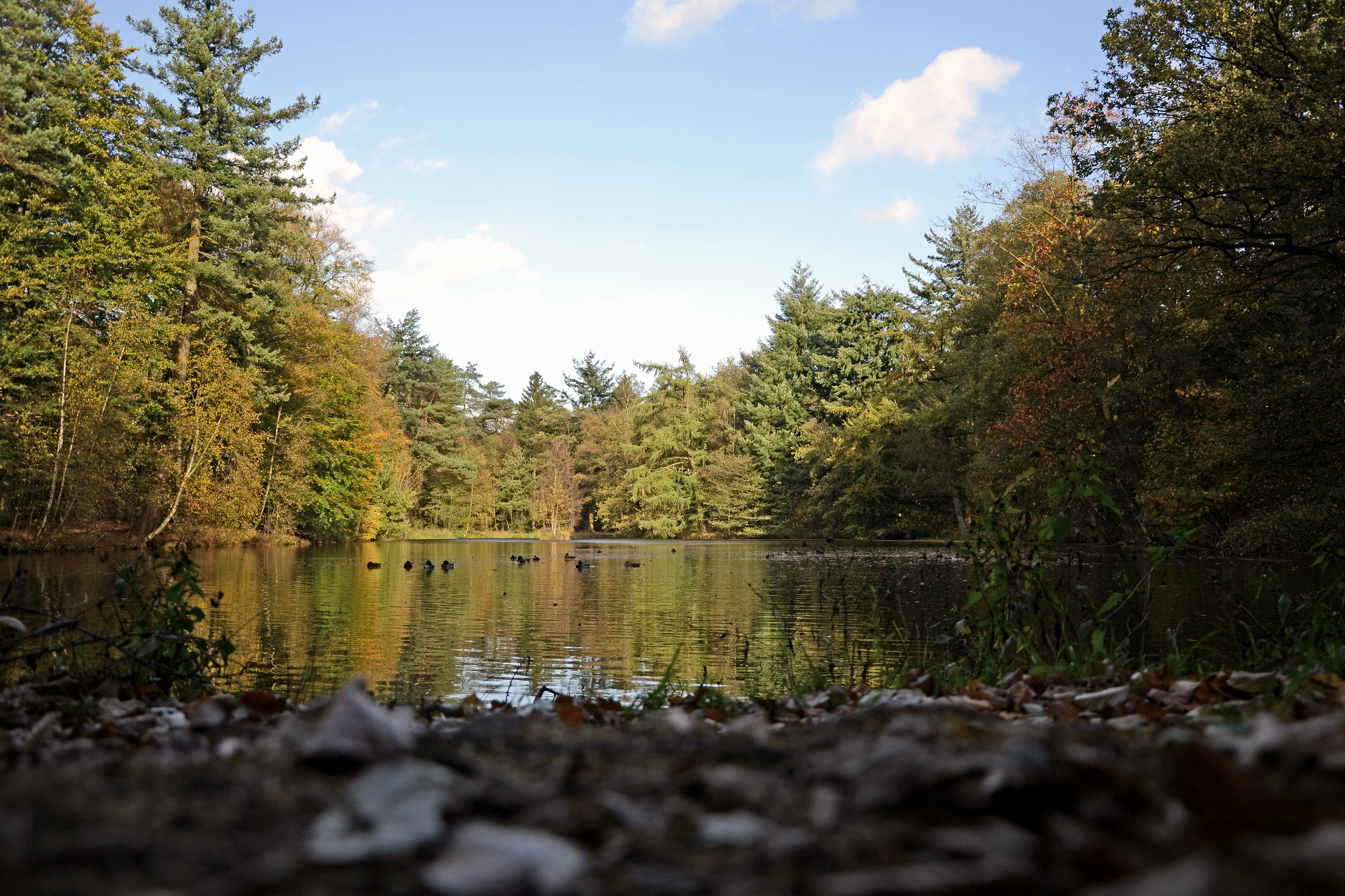 Emmerdennen, Emmen, Netherlands